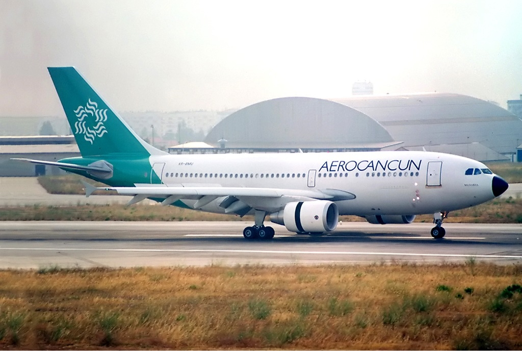 Aerocancun Airbus A310-300